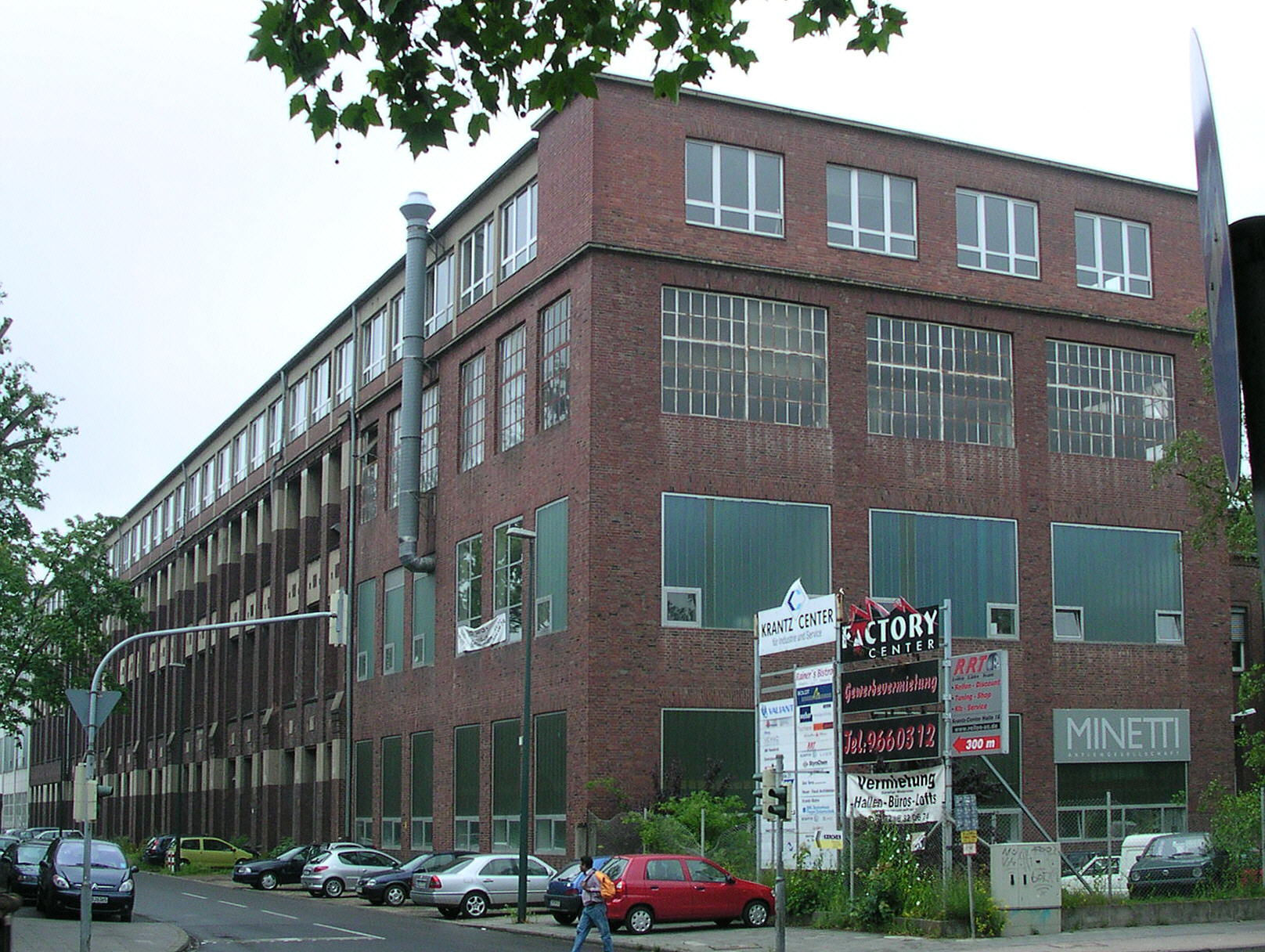 Aachen, ehemaliges Werk des Transformatorenherstellers Garbe & Lahmeyer, seit 1994 verschiedene Nutzungen